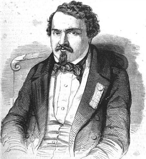 Caussidière.